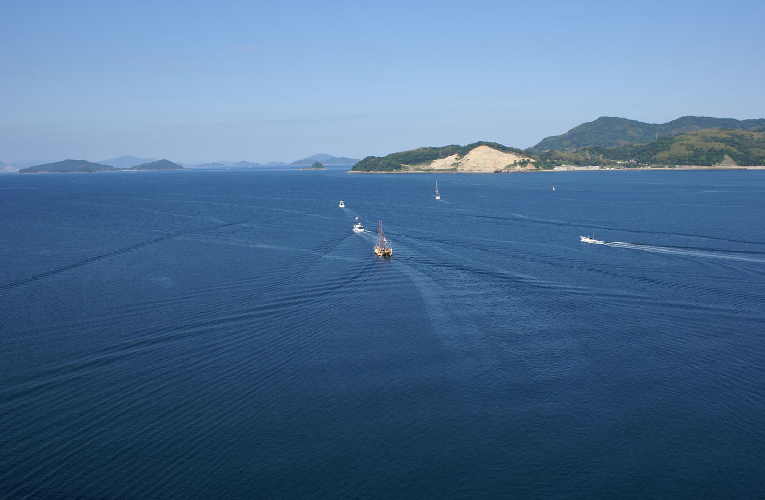 Suo Oshima and Hokule'a